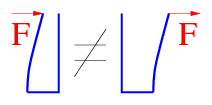 Bei deformierbaren Körpern (blau) dürfen Kraftangriffspunkte nicht verschoben werden